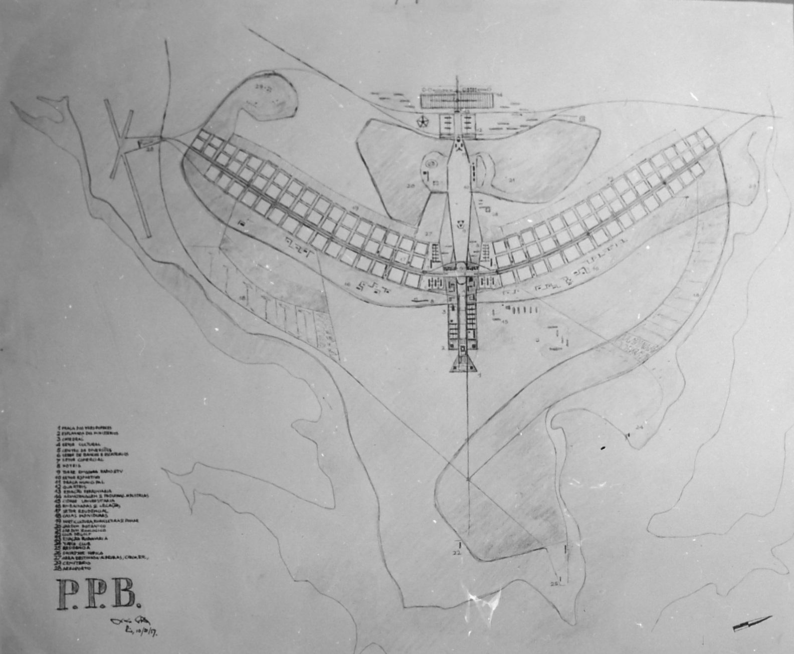 Imagem do Fundo Agência Nacional, do Arquivo Nacional